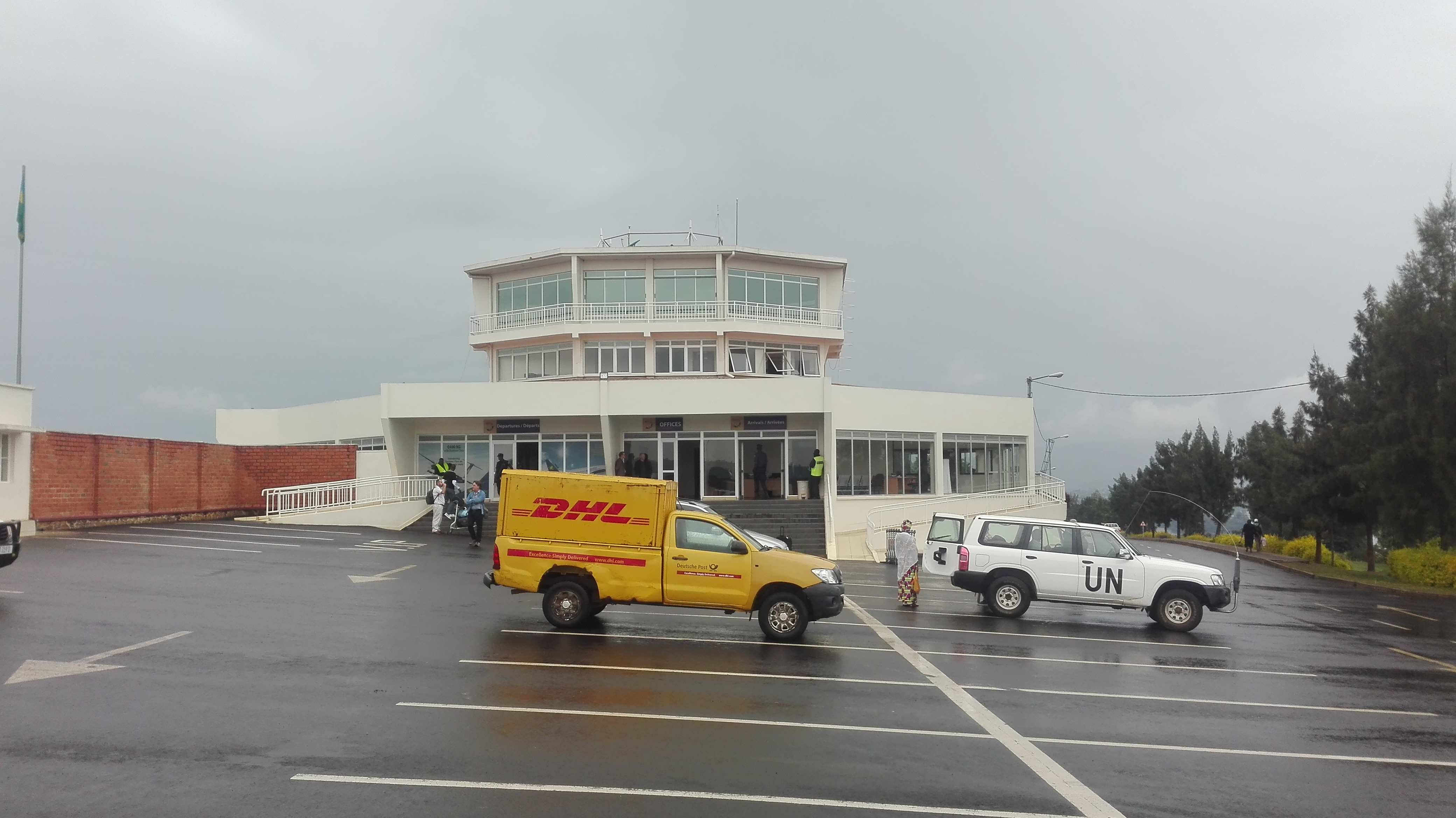 Kamembe lufthavn fra utsiden.